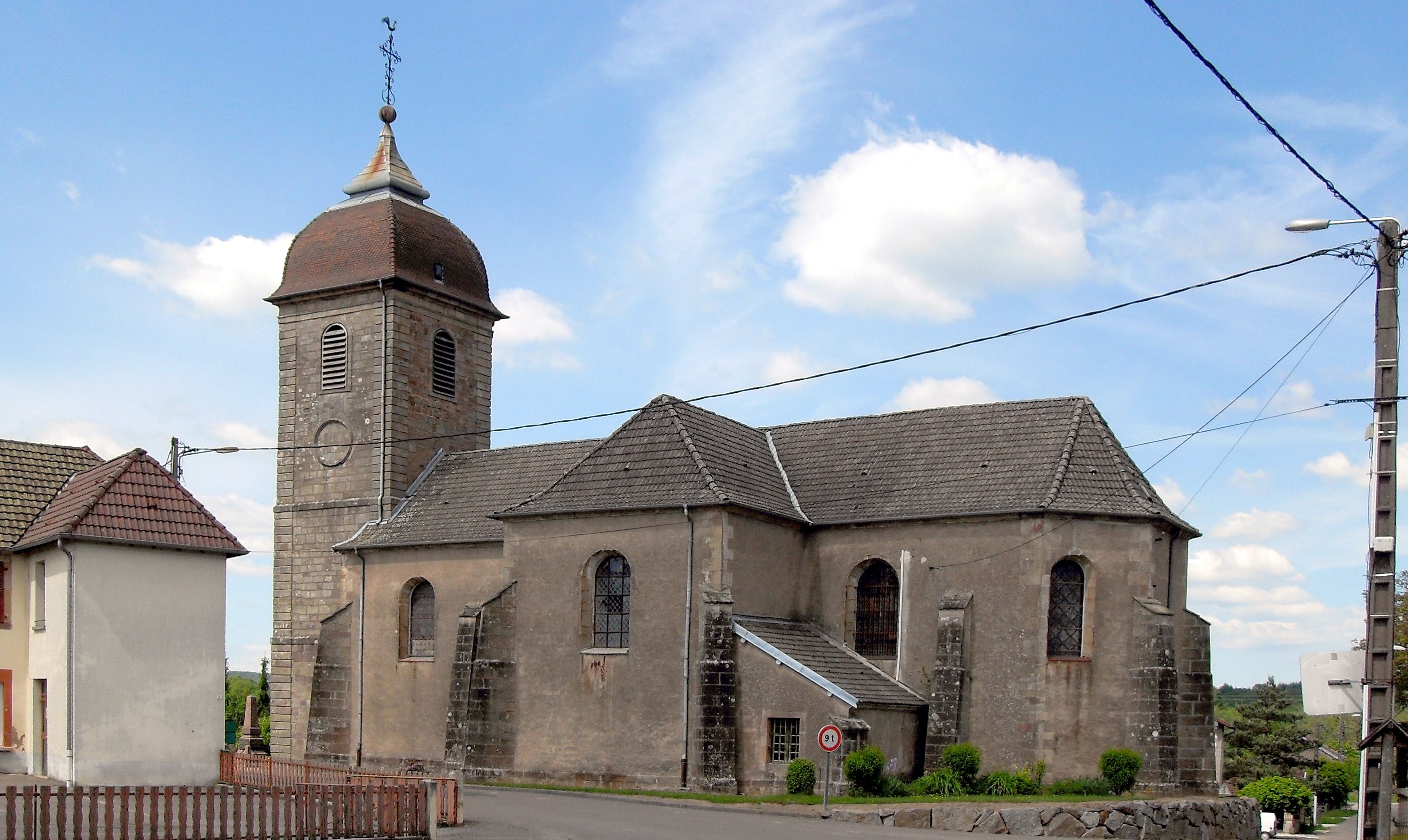 L'église Saint-Barthélemy à Saint-Barthélemy